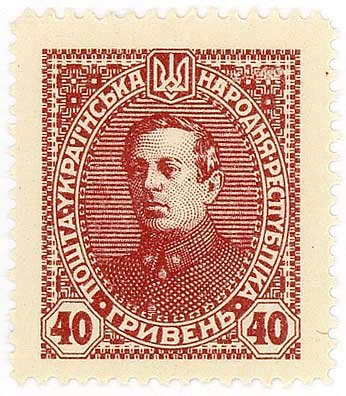 Марка УНР номіналом 40 гривень. Віденська серія.